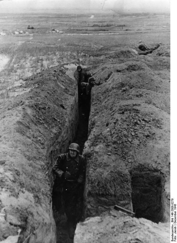 Die HKL im Raum Newel. Hier im vordersten Graben der Hauptkampflinie im Mittelabschnitt der Ostfront entscheidet sich in den meisten Fällen ein von den Sowjets unternommener Vorstoß gegen unsere Linien. PK.-Aufn.-Kriegsber.: Jacob, 28.12.1943 [Herausgabedatum]